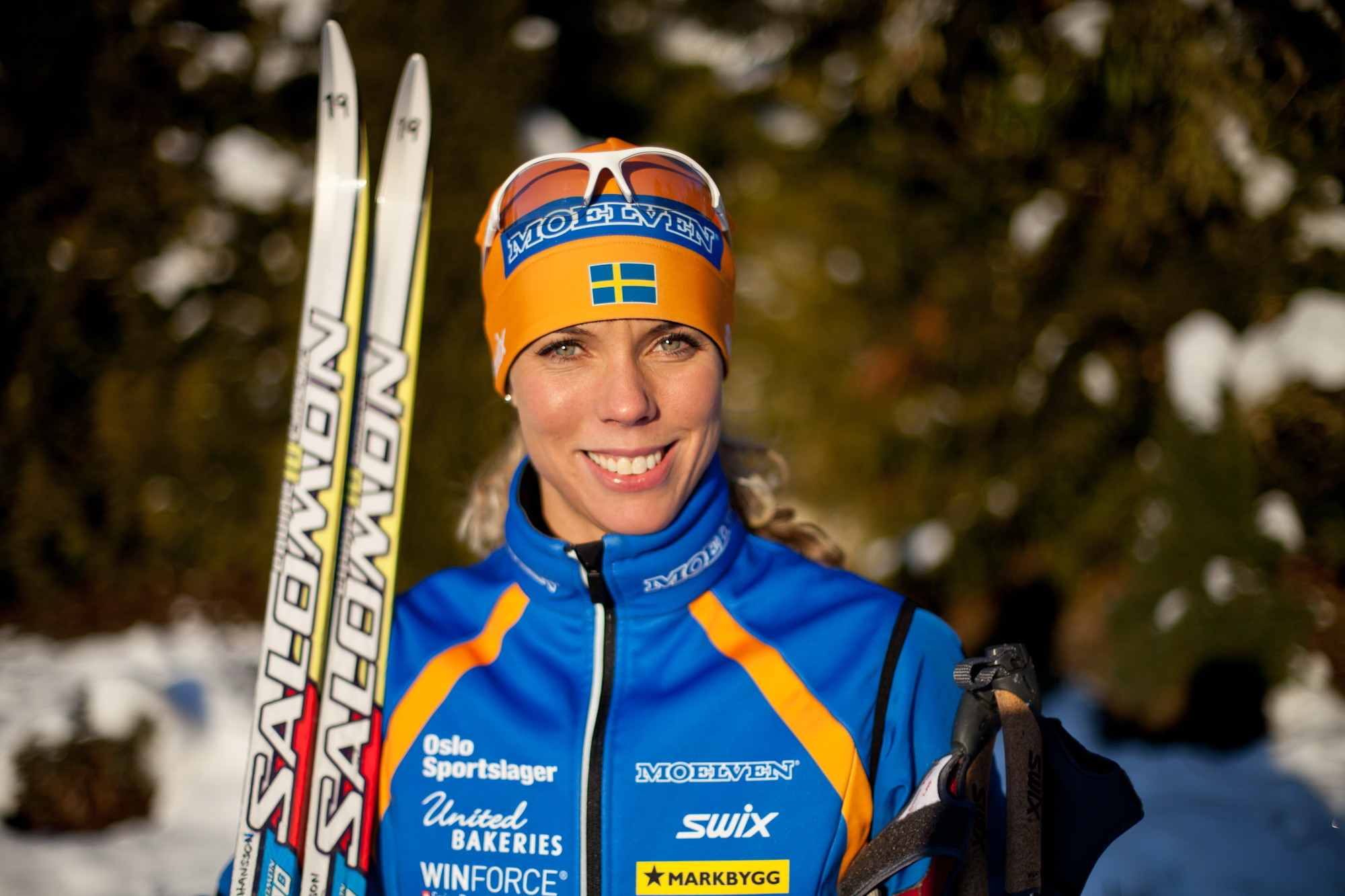 Skidåkerskan Sandra Hansson.